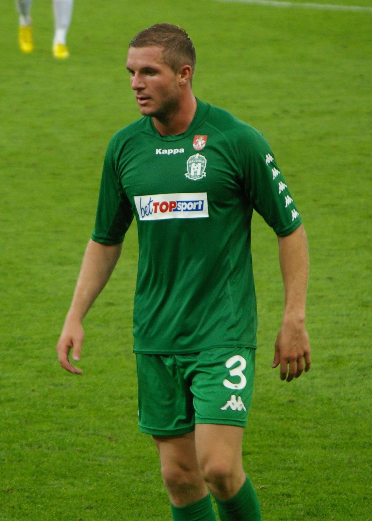 Euro League play off 2013